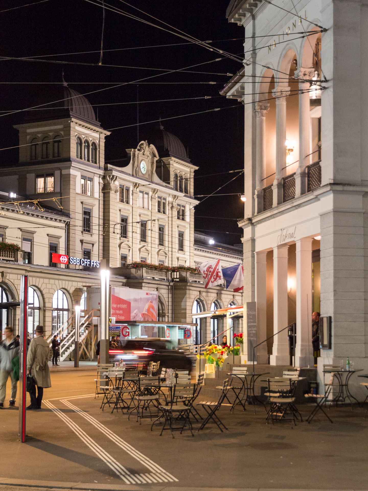 Abendlich beleuchteter Hauptbahnhof Winterthur in der Umbauphase. Rechts das Restaurant National.